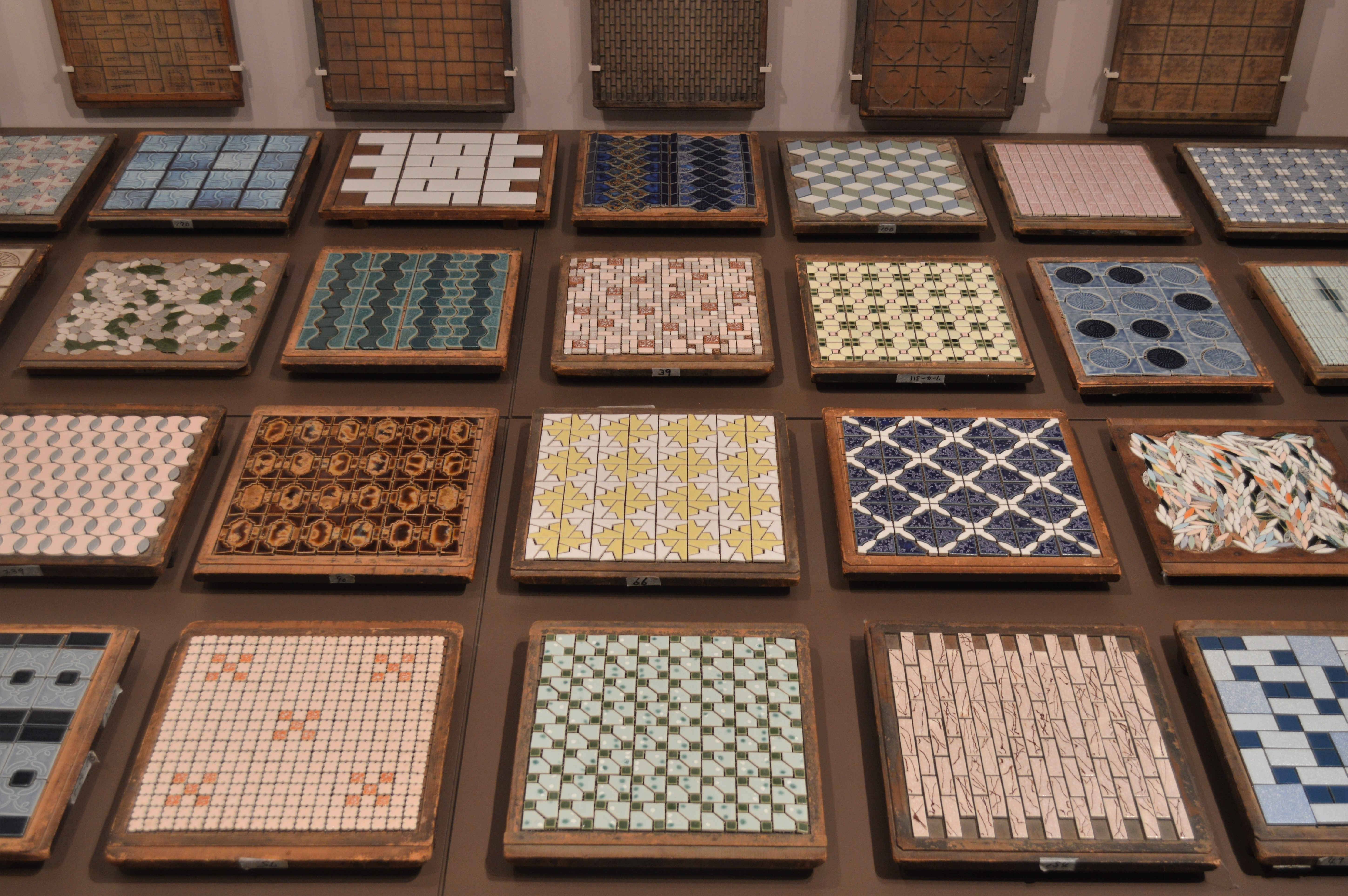 岐阜県多治見市の多治見市モザイクタイルミュージアム。